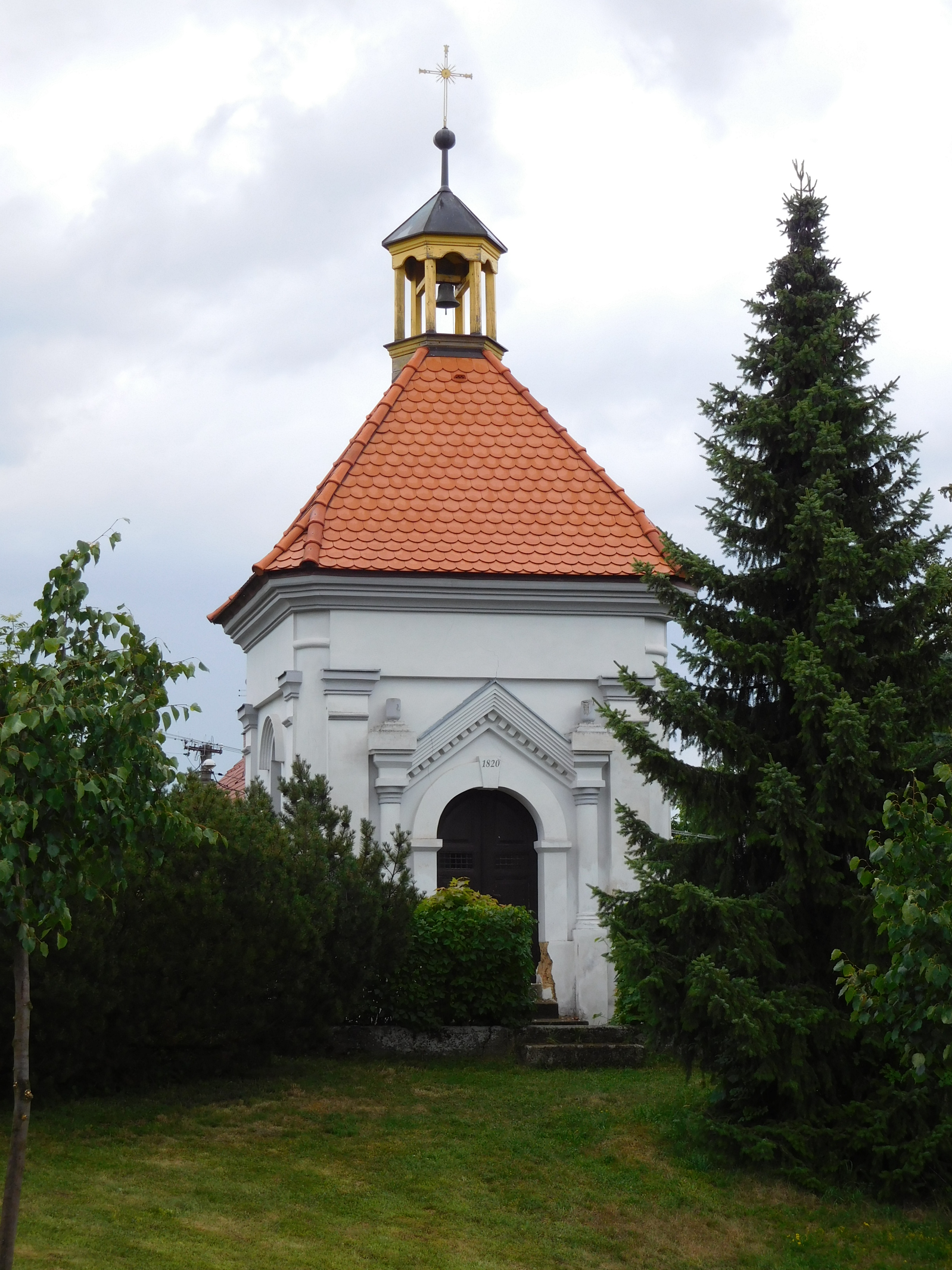 Vochov - kaple sv. Anny